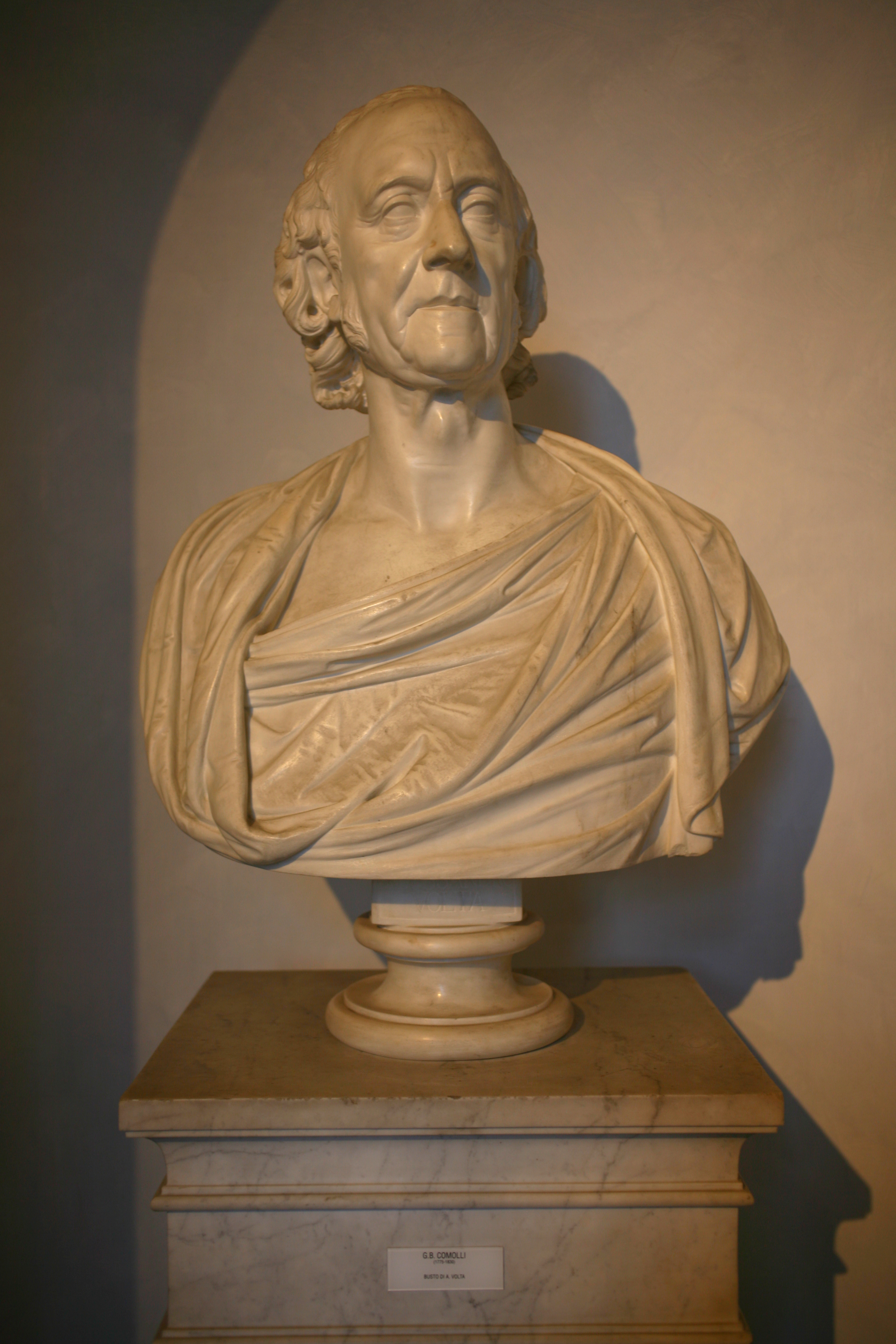 Giovanni Battista Comolli (1785-1830) busto di Alessandro Volta (1828), Galleria d'Arte Moderna di Milano